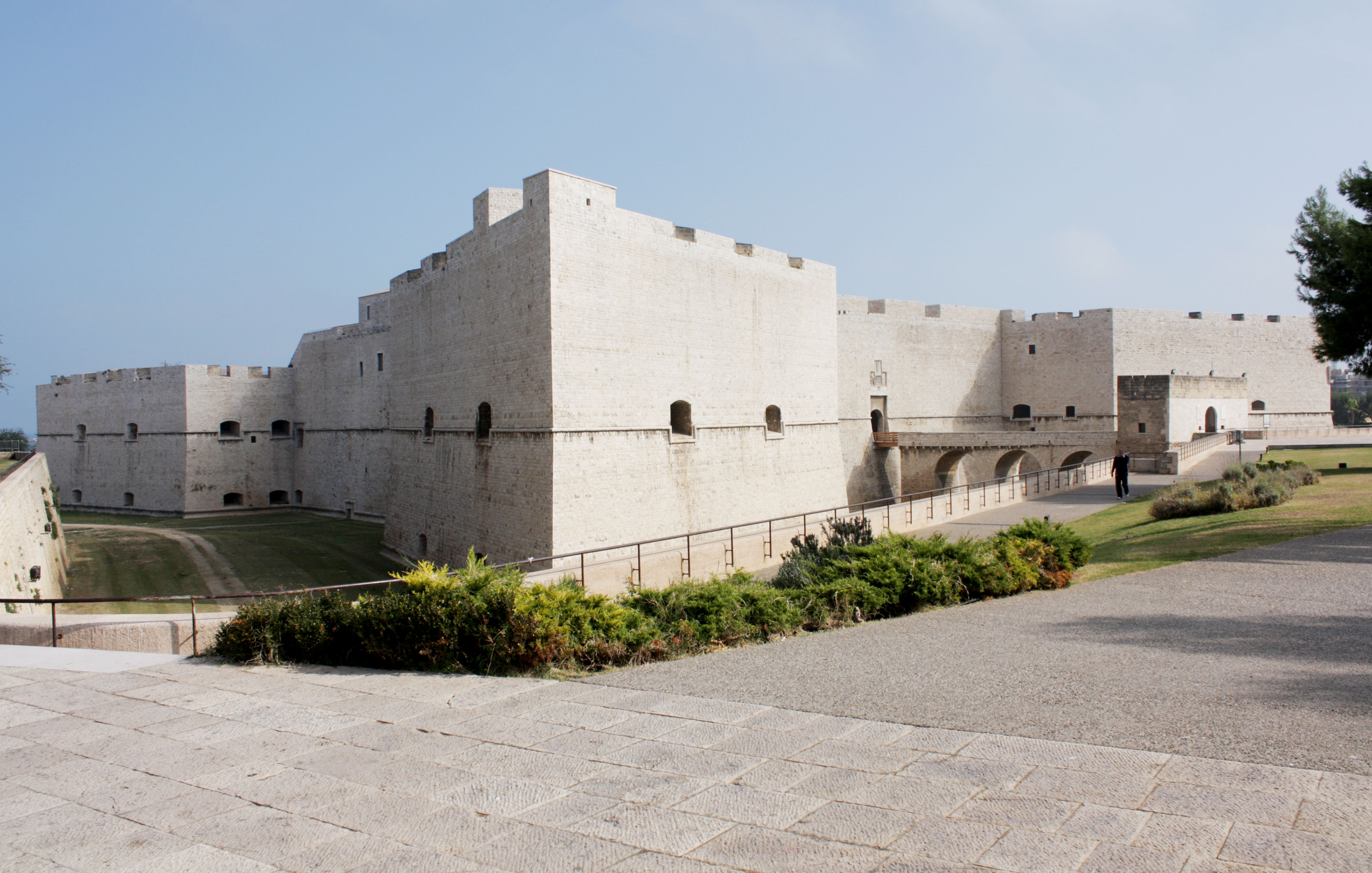 Il Castello di Barletta - Ottobre 2008